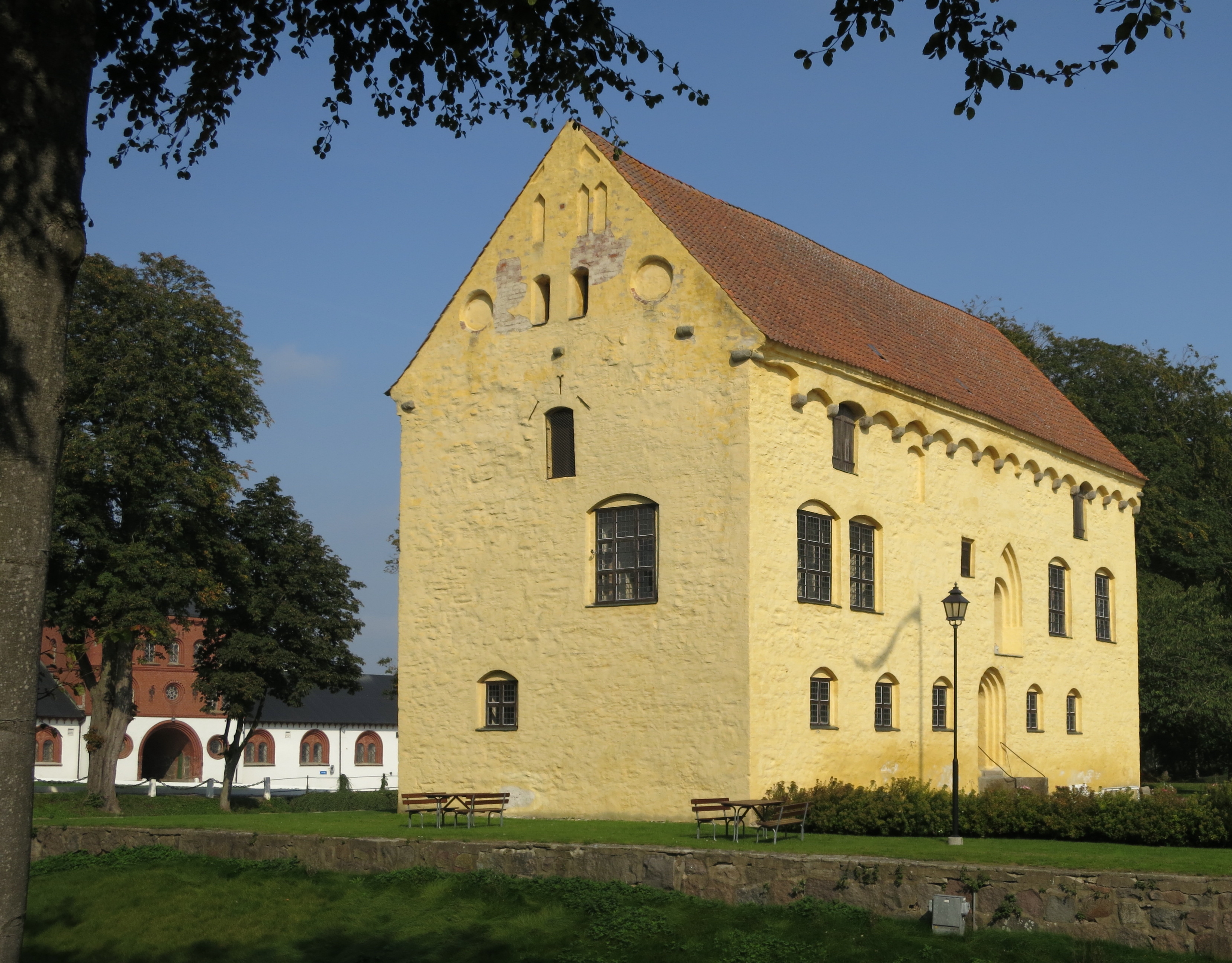 Bollerups borg (Bollerups säteri 3:5)